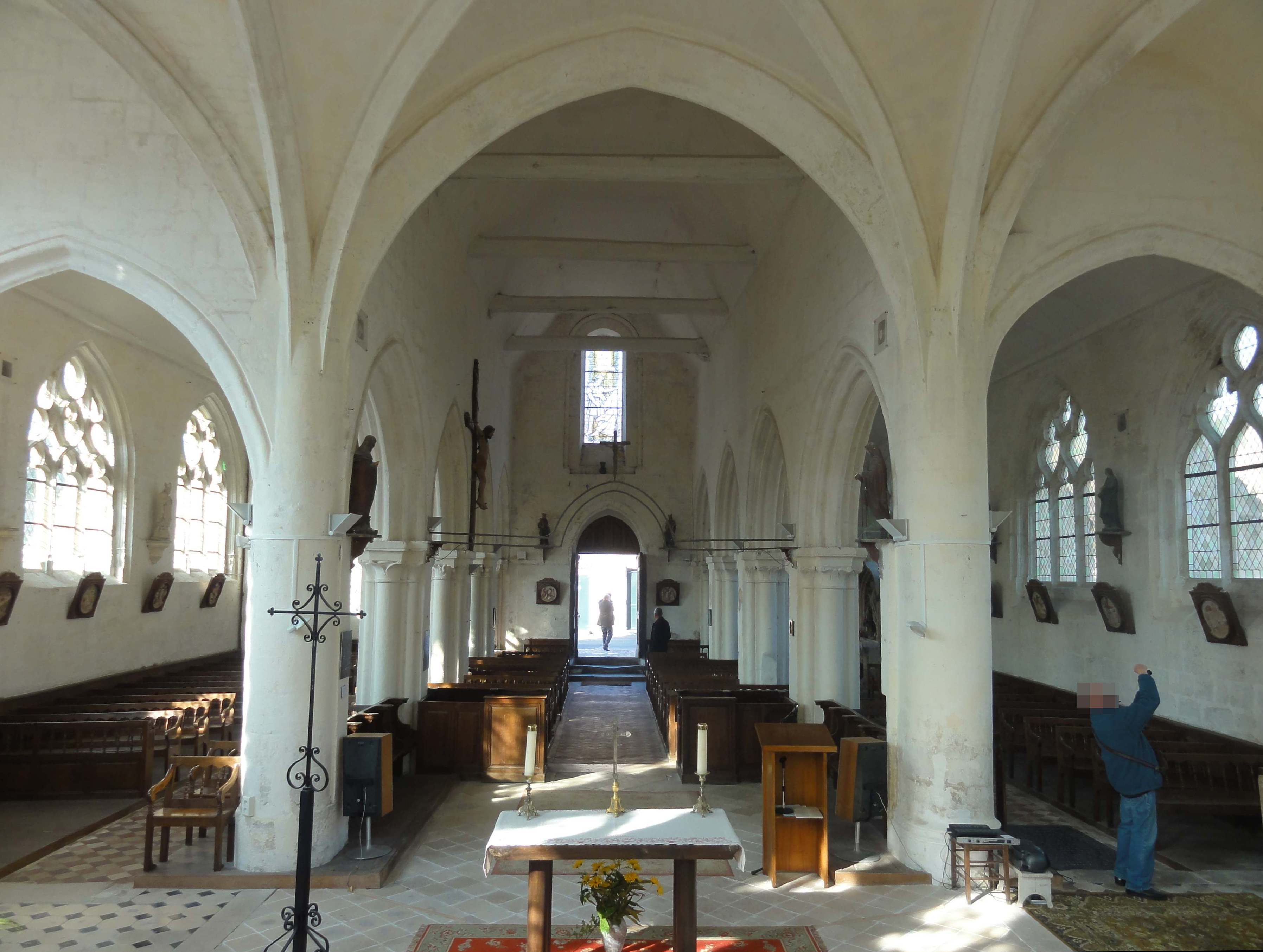 Intérieur de l'église - voir titre.